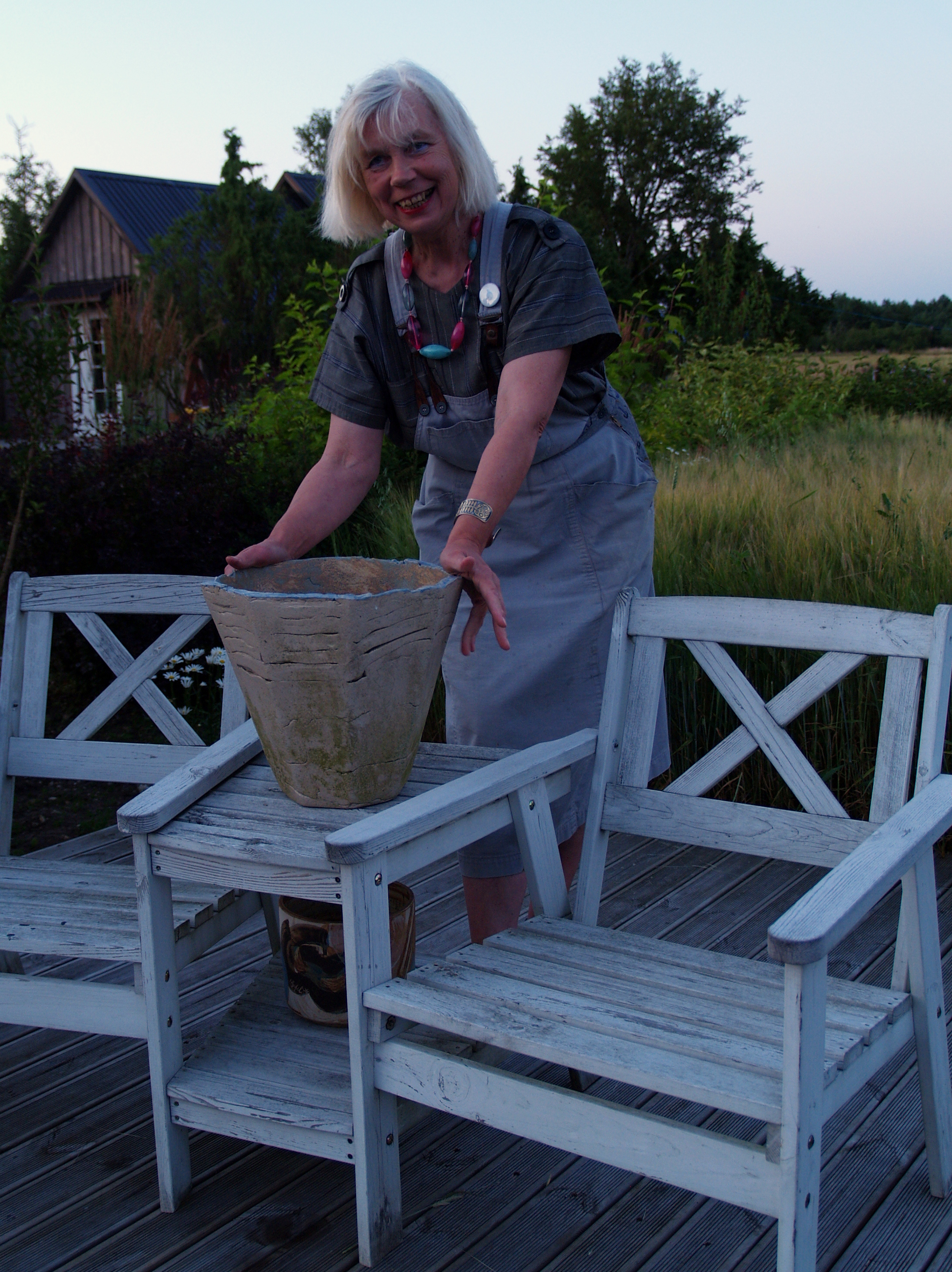 Eesti keraamik Marget Tafel.